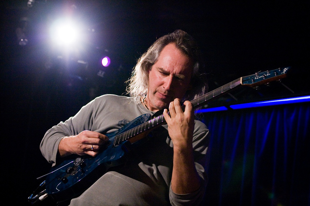 Louis Winsberg en concert au Triton, le 14 décembre 2007, avec le trio de Médéric Collignon photo de Christophe Alary